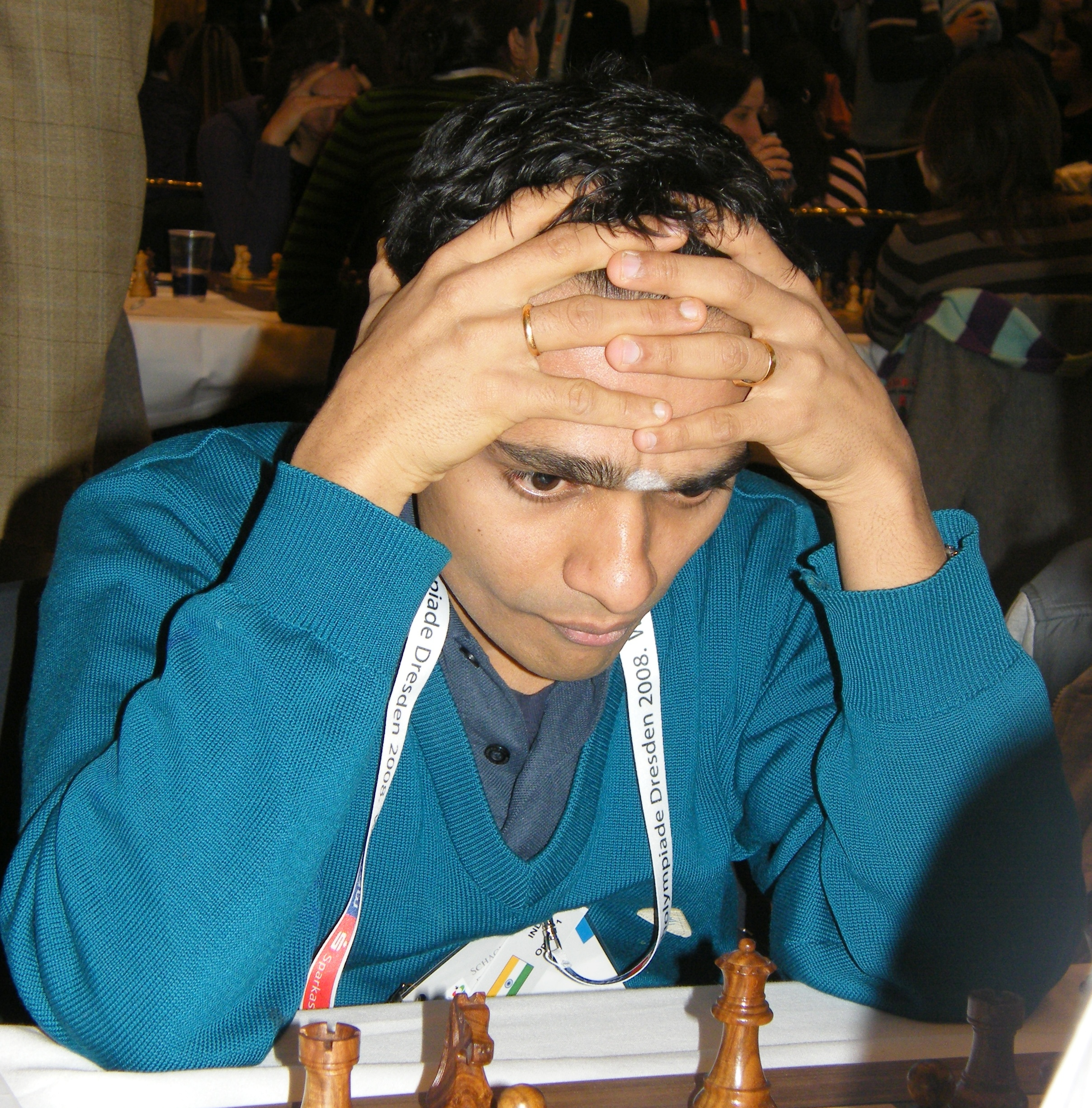 Krishnan Sasikiran bei der 38. Schacholympiade in Dresden 2008